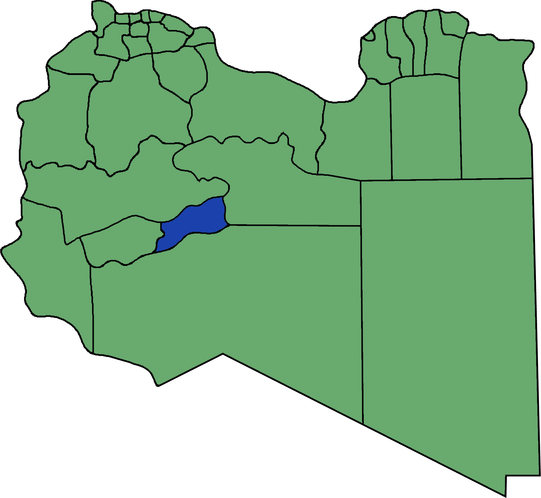 Die neuen Gemeinden (Munizipien) in Libyen. Sabha hervorgehoben.